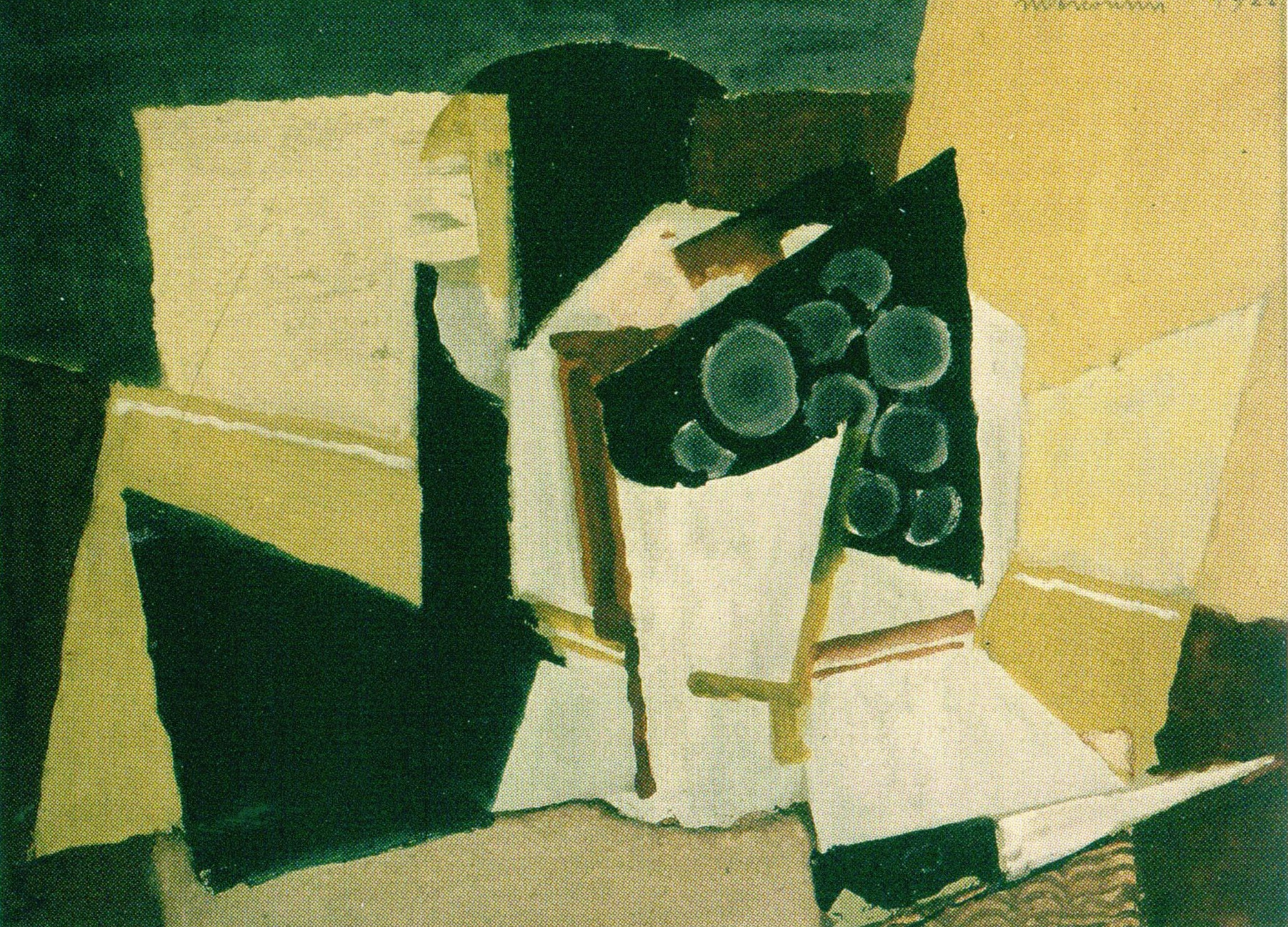 La grappe de raisins, Gemälde; ehemaliges Eigentum Sophie Lissitzky-Küppers, 1926 Leihgabe an das Provinzial Museum Hannover, 1937 beschlagnahmt, von dem Kunsthändler Hildebrand Gurlitt gekauft an den Kölner Sammler Josef Haubrich weiterverkauft, gelangte später in das Museum Ludwig. im jahr 2000 restituiert